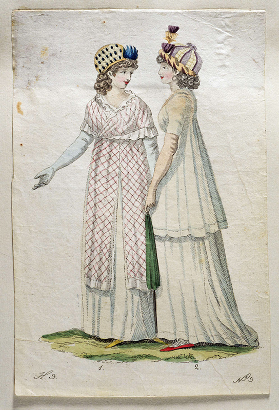 Handkolorerad modeplasch från mars 1800. Damerna bär toquer, påsliknande mössor utan brätten.